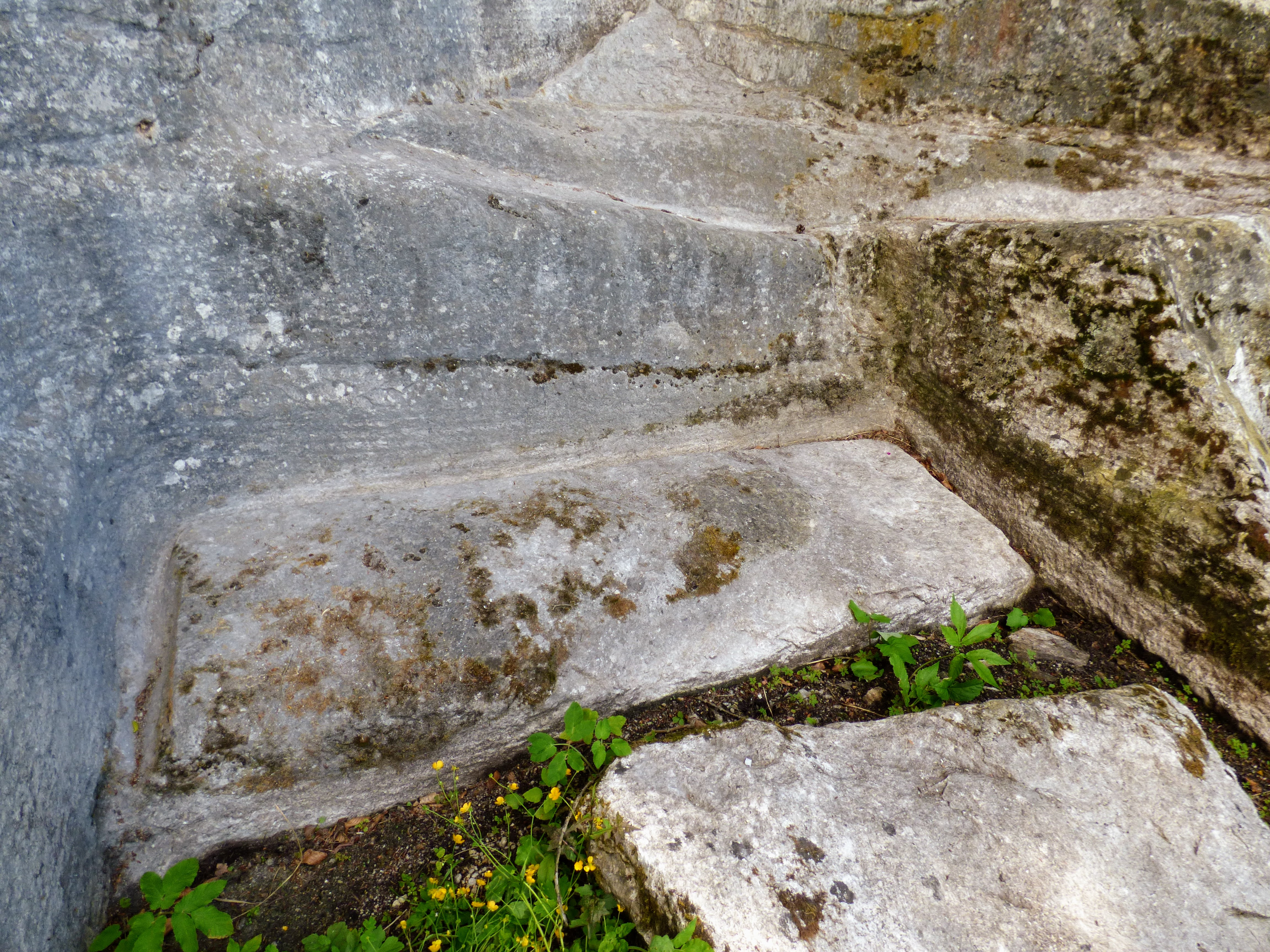 Römischer Steinbruch Spitzelofen, Gemeinde St. Georgen im Lavanttal, Kärnten halbfertiger Marmorblock